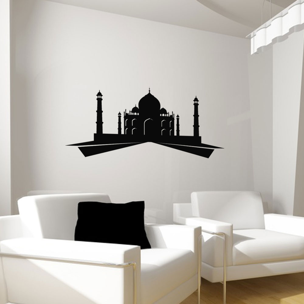 Mise en situation d'un sticker représentant le Taj Mahal